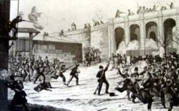 Lámina del siglo XIX donde se ilustra la sublevación de Barcelona de 1842 contra el General Espartero..